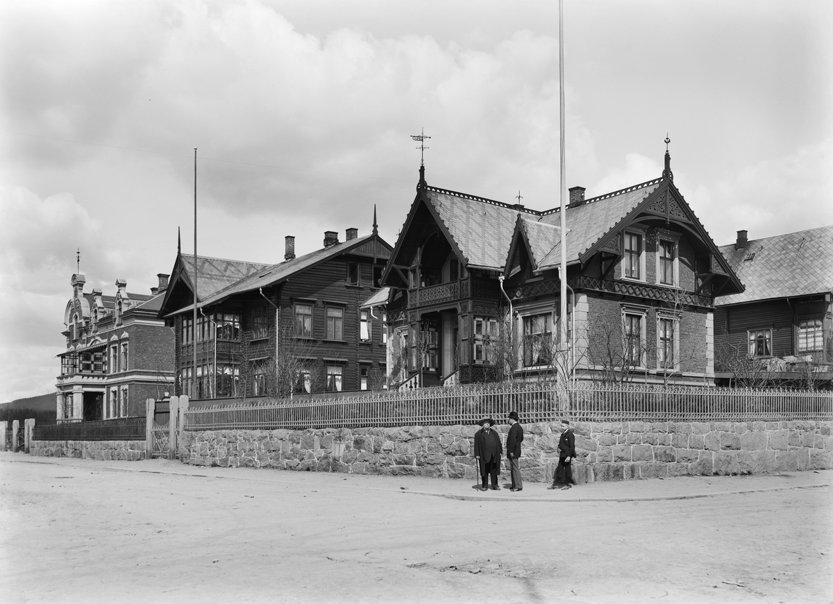 Gyldenløves gate 43, 45 og 47 rundt år 1900. Foto: Jesper Jespersen. Fra Byhistorisk samling hos Oslo Museum.